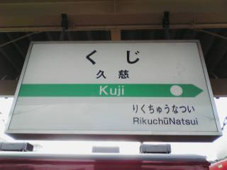 JR久慈駅 駅名標